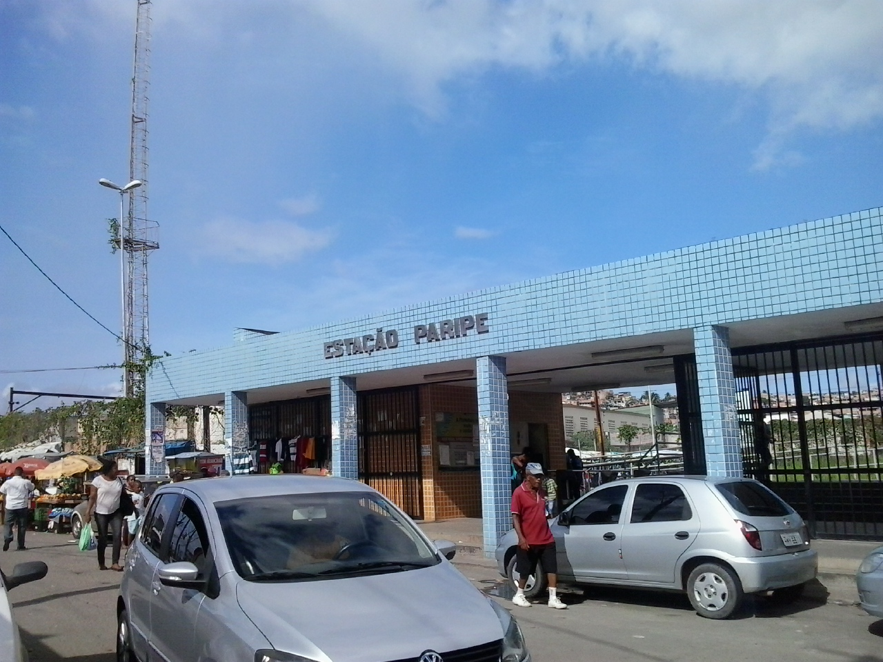 Frente da Estação Paripe do Sistema de Trens do Subúrbio de Salvador.